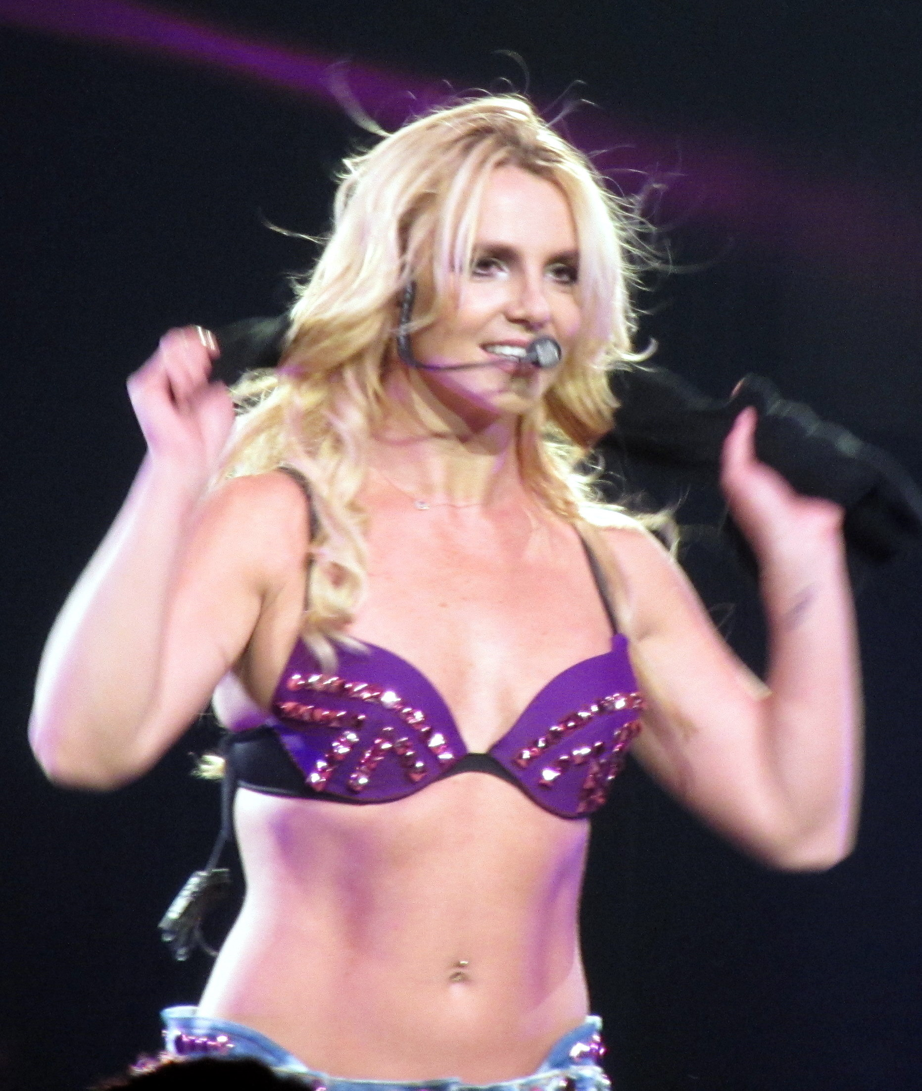 BRITNEY SPEARS FEMME FATALE 2011